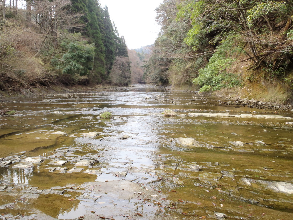 小櫃川 2013-03-24